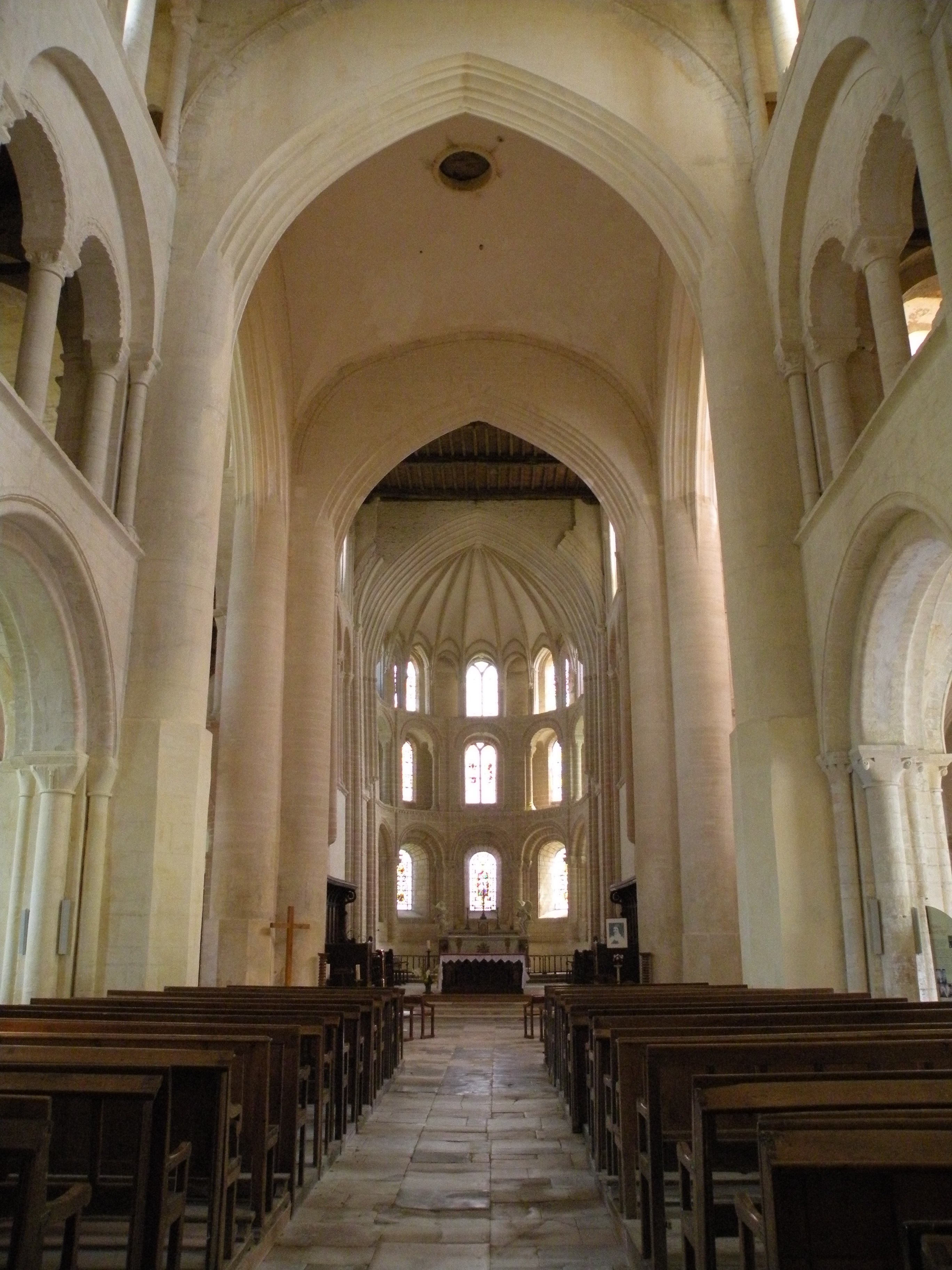 Intérieur de l'Abbatiale de Cerisy-la-Forêt